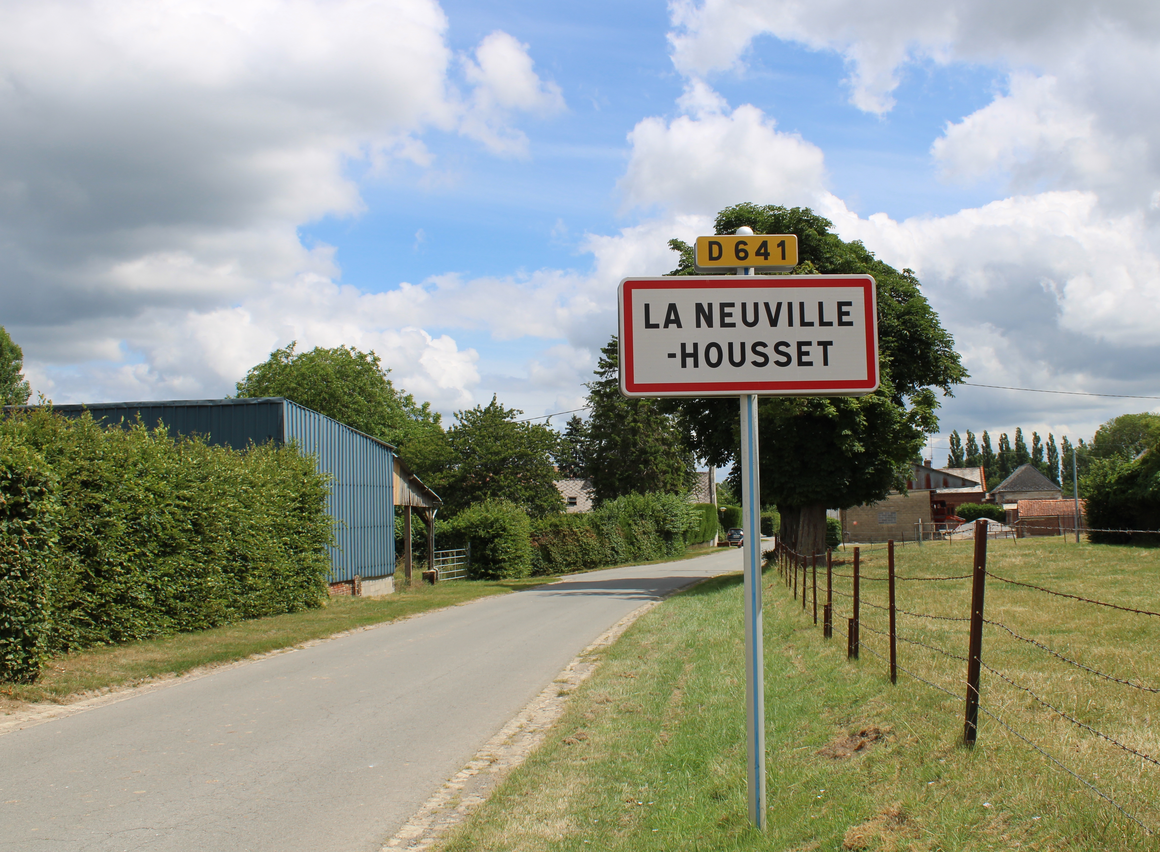 Entrée du village